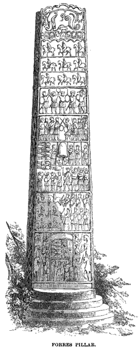 Sueno's Stone